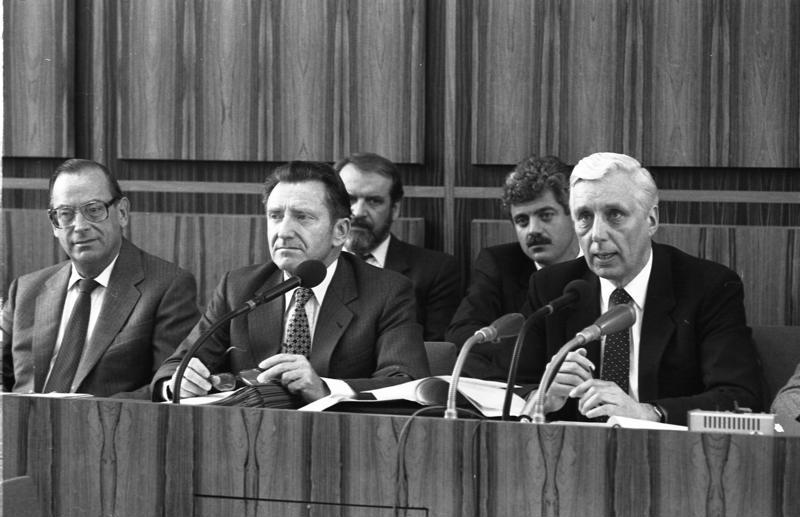 22.4.1983 Pressekonferenz nach der 115. Konferenz der Innenminister und -Senatoren. (Themen: Volkszählung, Teilzeitarbeit u.a.)